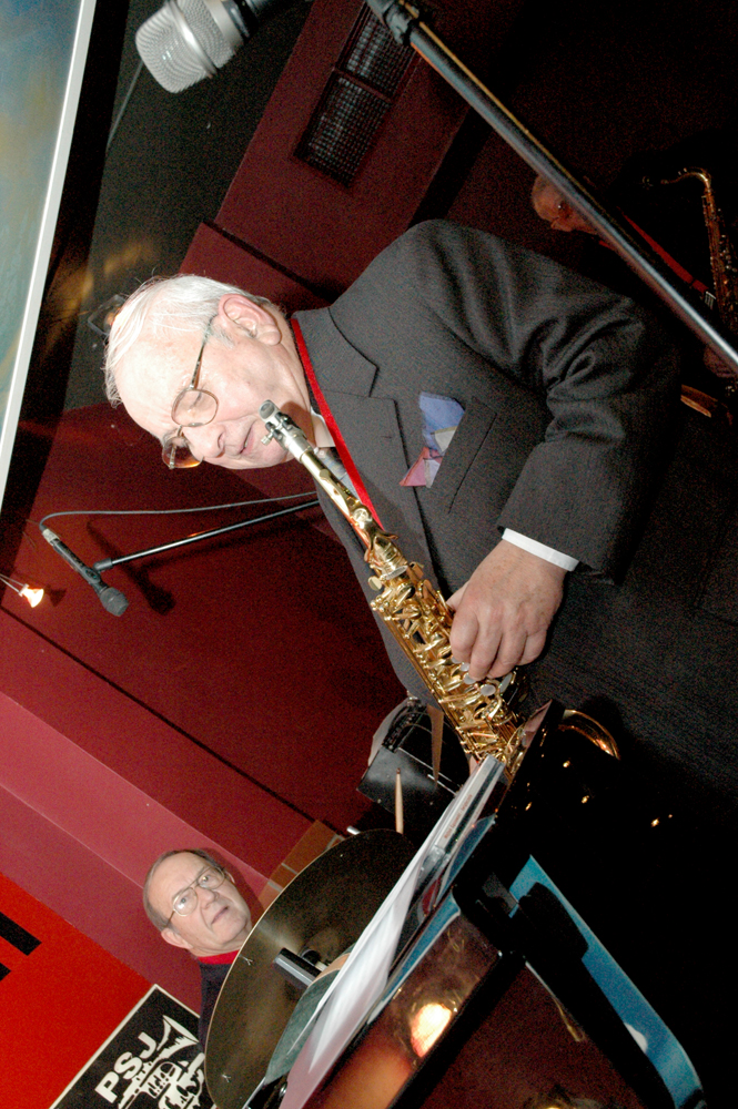 Prolific film music composer, jazz performer Jerzy Matuszkiewicz at jazz club Tygmont in Warszawa in December 2006. Photograph by Henryk Kotowski.